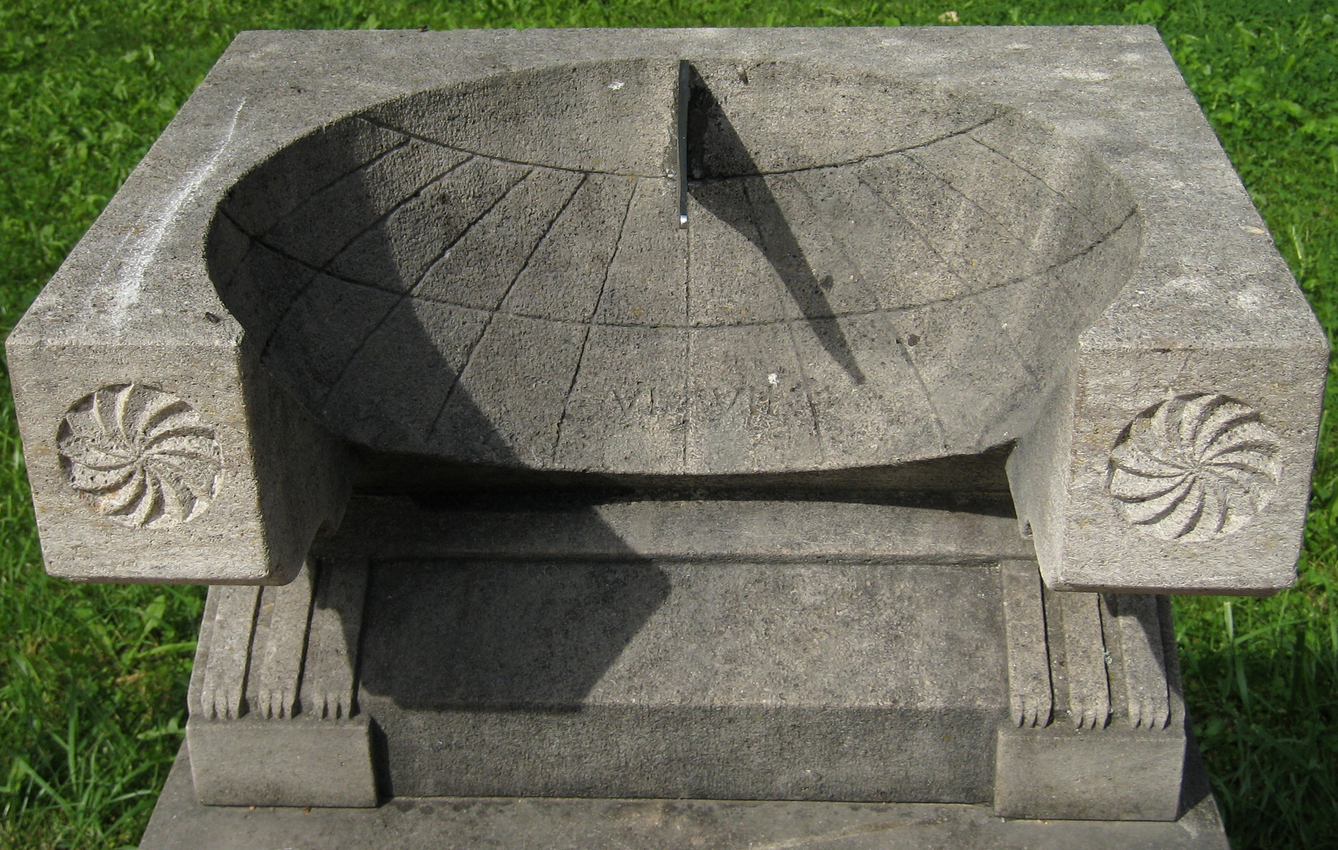 Nachbildung einer römischen Sonnenuhr (Skaphe), aufgestellt im Kurpark von Badenweiler. Badenweiler/Süd-Schwarzwald/Deutschland